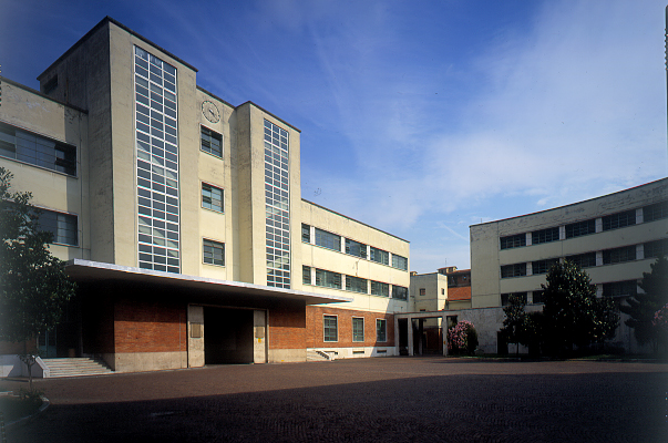 autoistazione sita